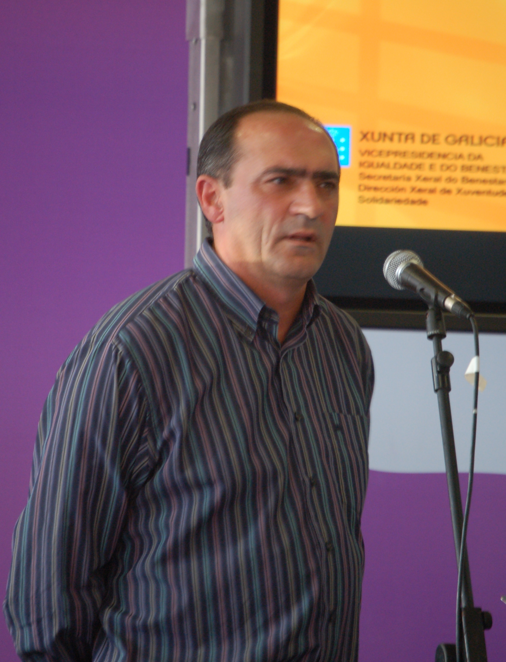 Anxo Angueira recitando no CulturGal